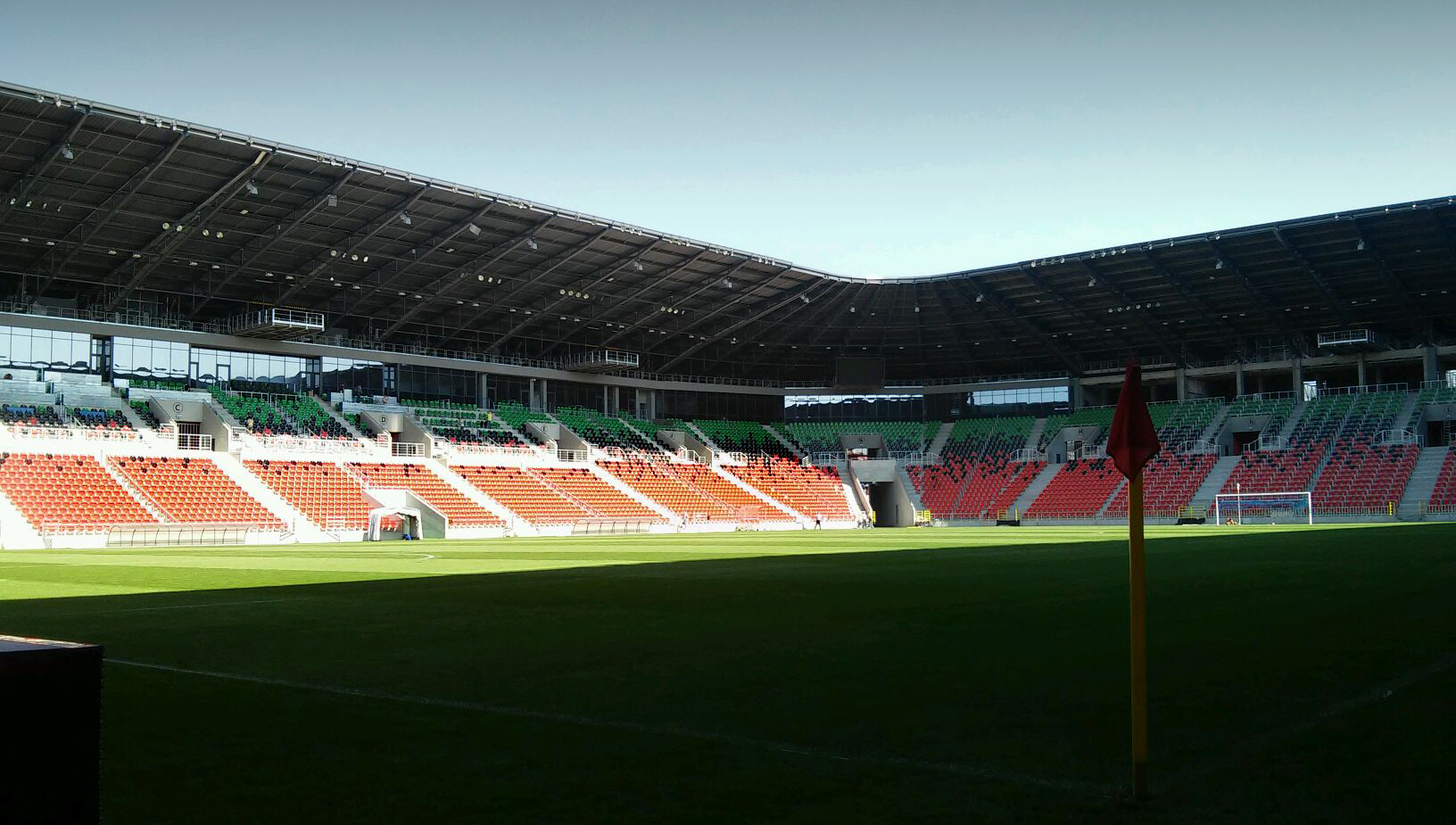 Wnętrze Stadionu Miejskiego w Tychach